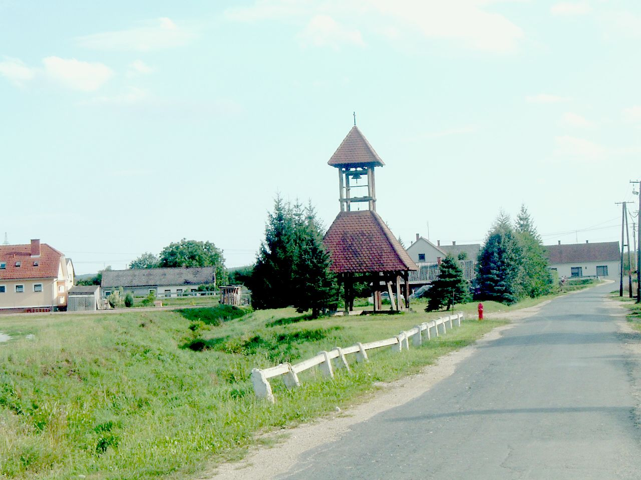 Bell-tower in Rönök